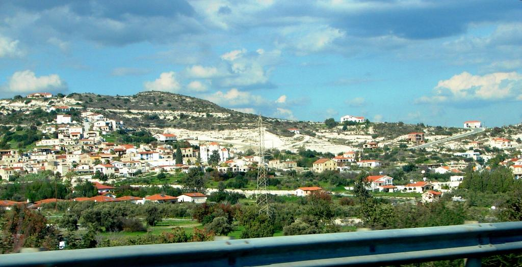 a@a skarinou village from limassol to nicosia Cyprus